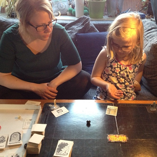 Drakborgen från 1985 spelas.